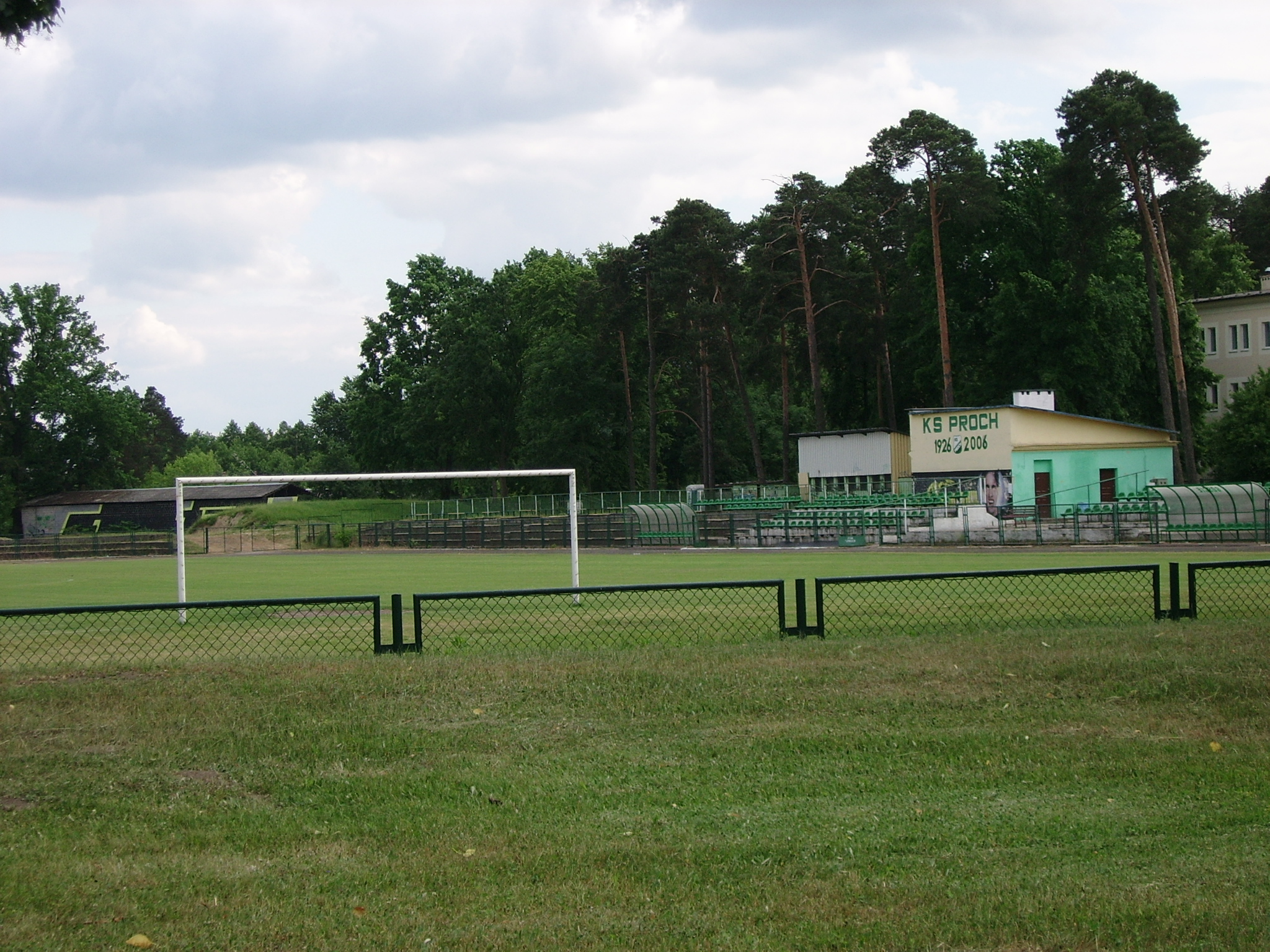 Fragament stadionu miejskiego w Pionkach – widok od Alei Jana Pawła II